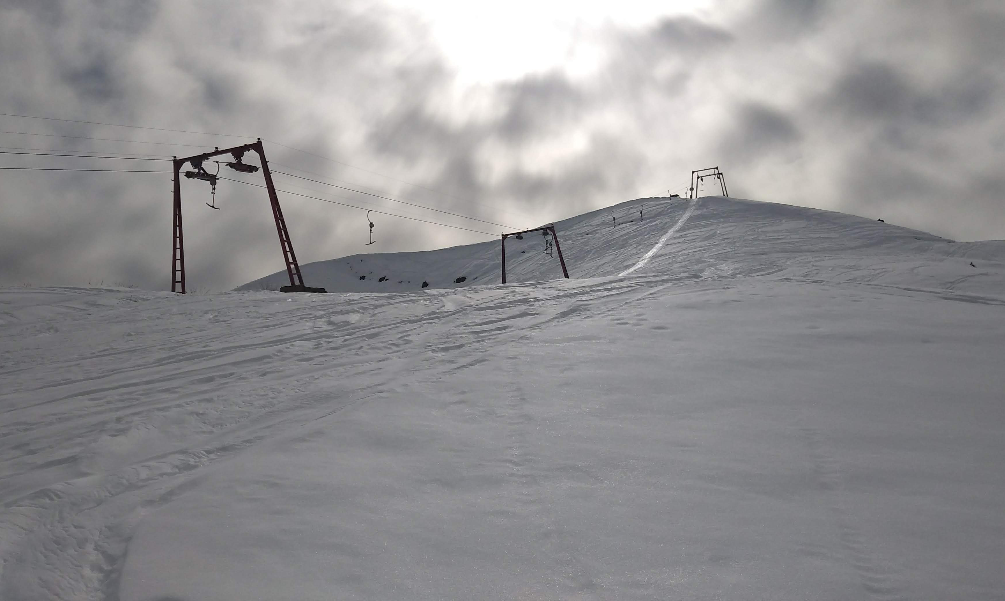 Andarivel La lola